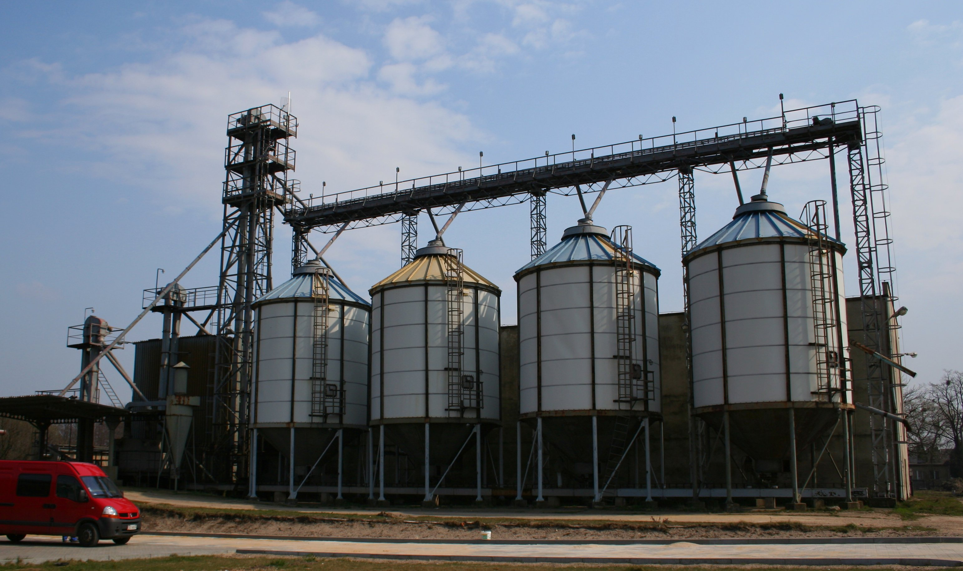 Silosy w Boronowie, powiat lubliniecki, województwo śląskie